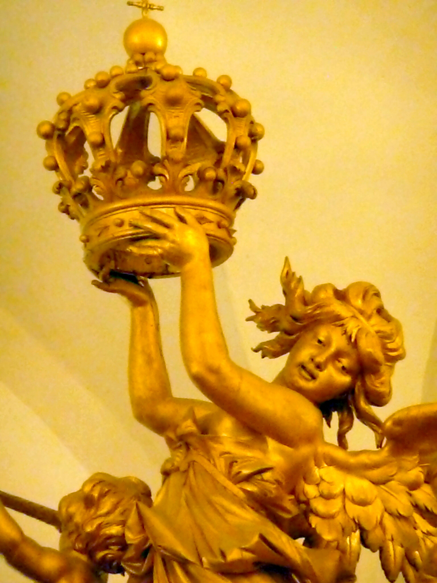 Die Fama ziert den kleinen Galawagen von König Ludwig II. von Bayern